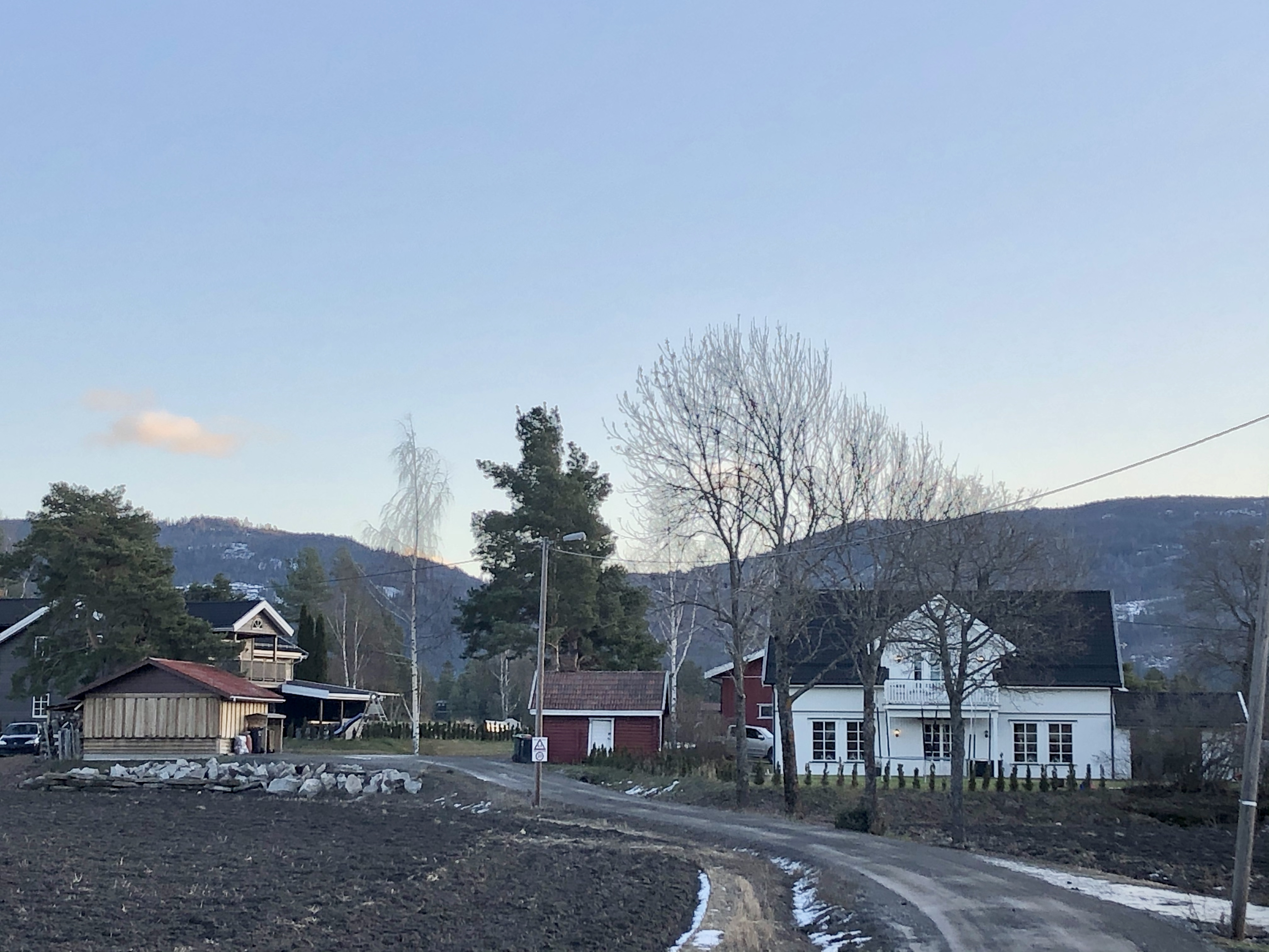 Myragata på Steinssletta i Hole kommune.